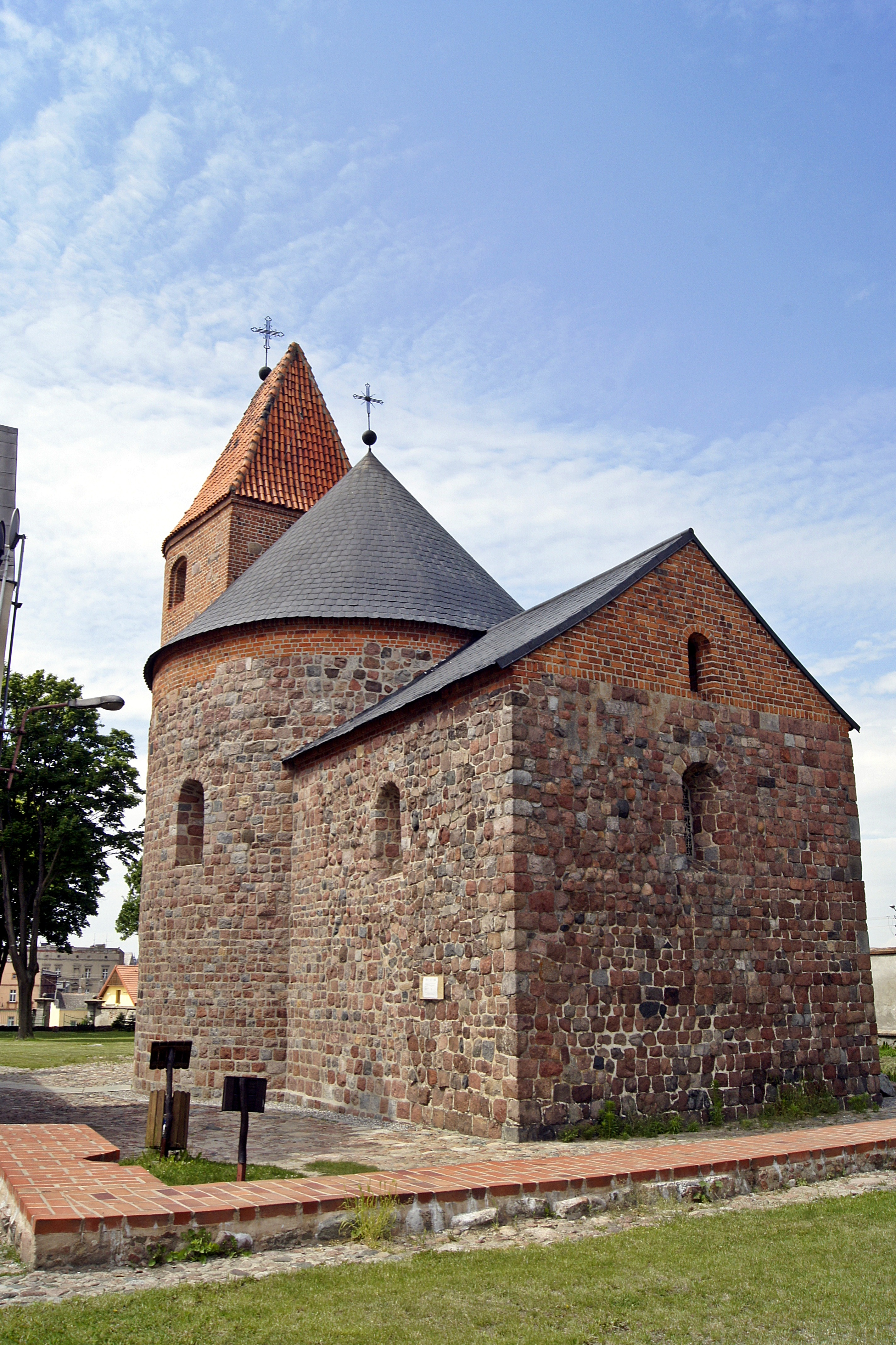 602353 kościół p.w. św. Prokopa_Strzelno_tył.jpg